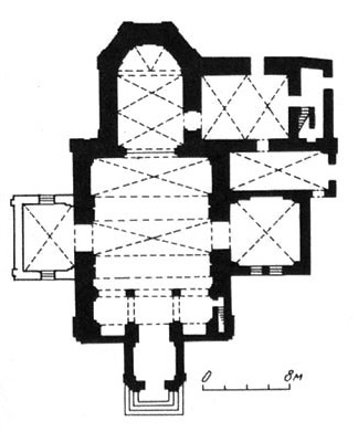 Львів костел Антонія